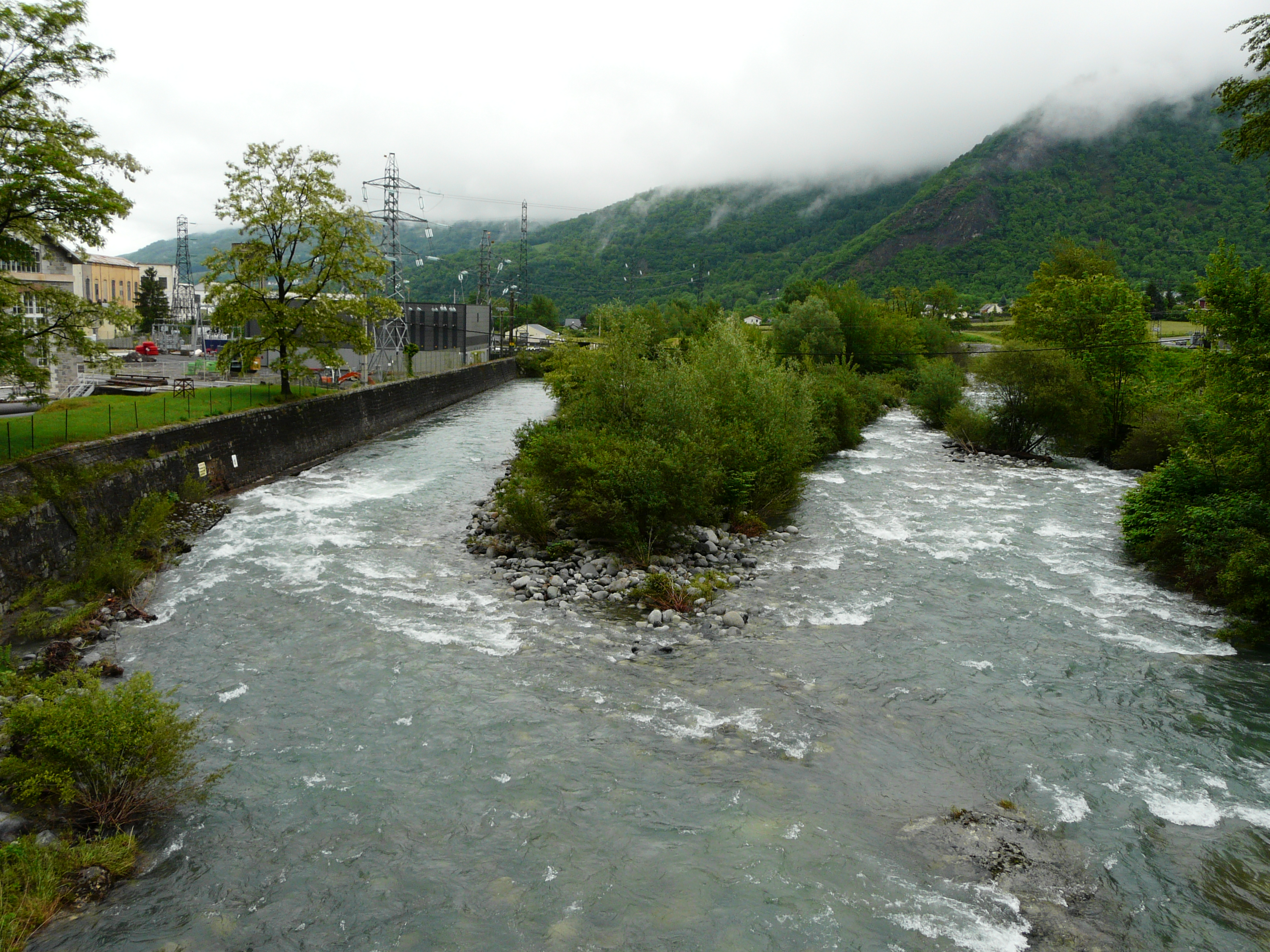 En aval du pont de la route départementale 921, le gave de Gavarnie marque la limite entre Soulom (rive gauche et île centrale) et Villelongue (rive droite), Hautes-Pyrénées, France.